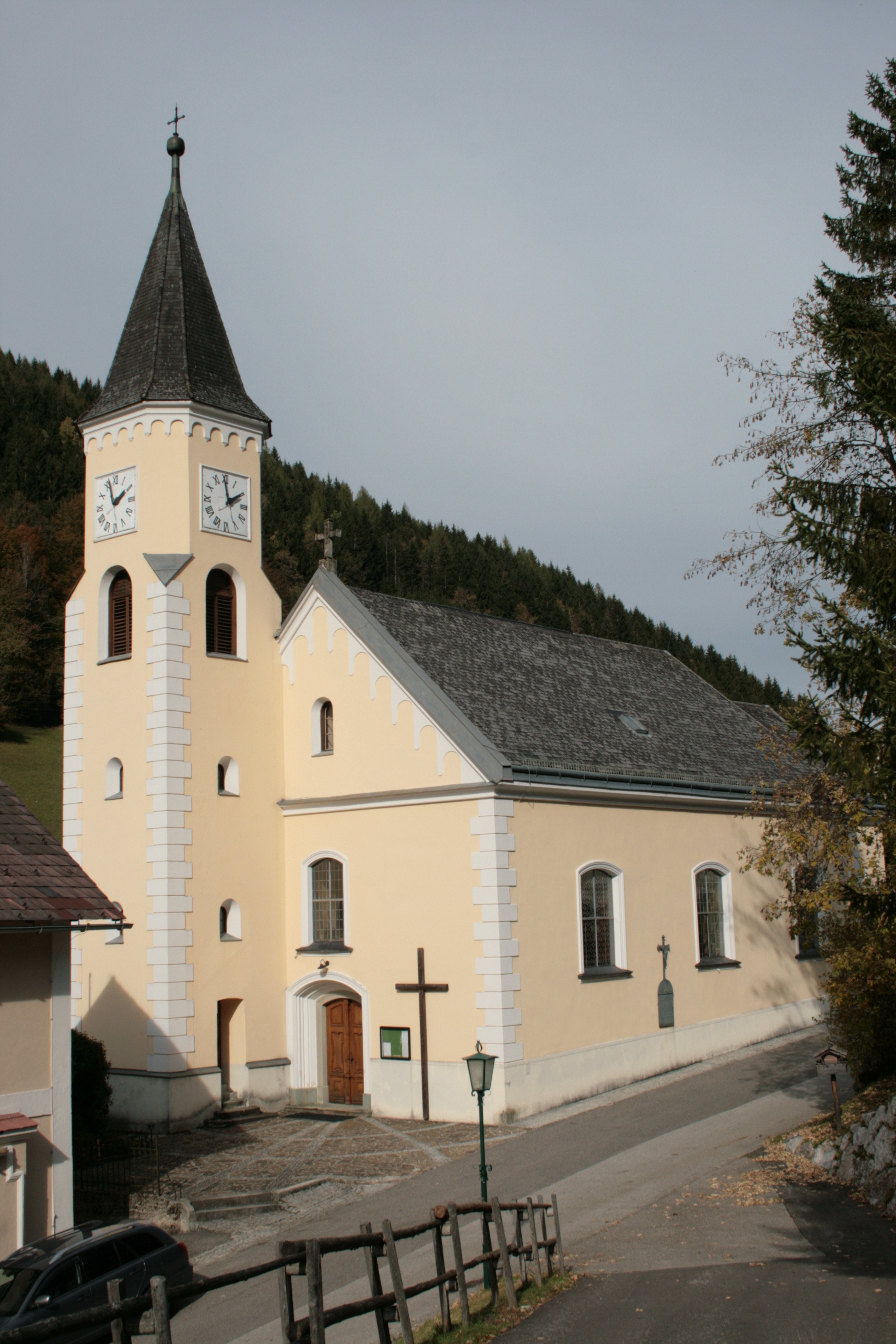 Kath. Pfarrkirche hl. Laurentius, Lassing, Gemeinde Göstling an der Ybbs, Niederösterreich